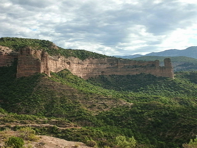 Aragonés: Penya Falconera